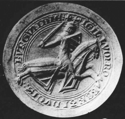 Sceaux de JRobert II de Bourgogne